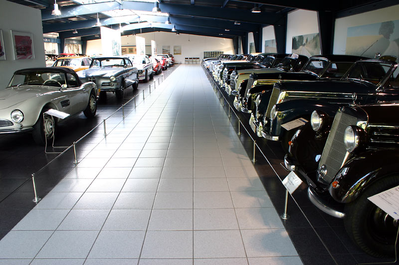 Eine Halle im EFA-Museum für Deutsche Automobilgeschichte